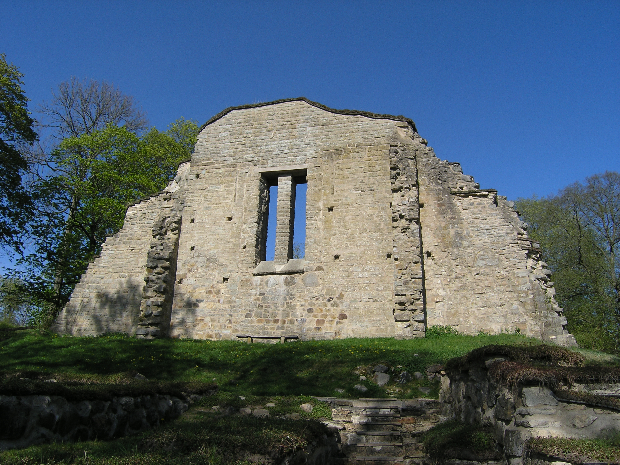 Riseberga Monastery Ruin (Riseberga kloster). Fjugesta, Sweden.